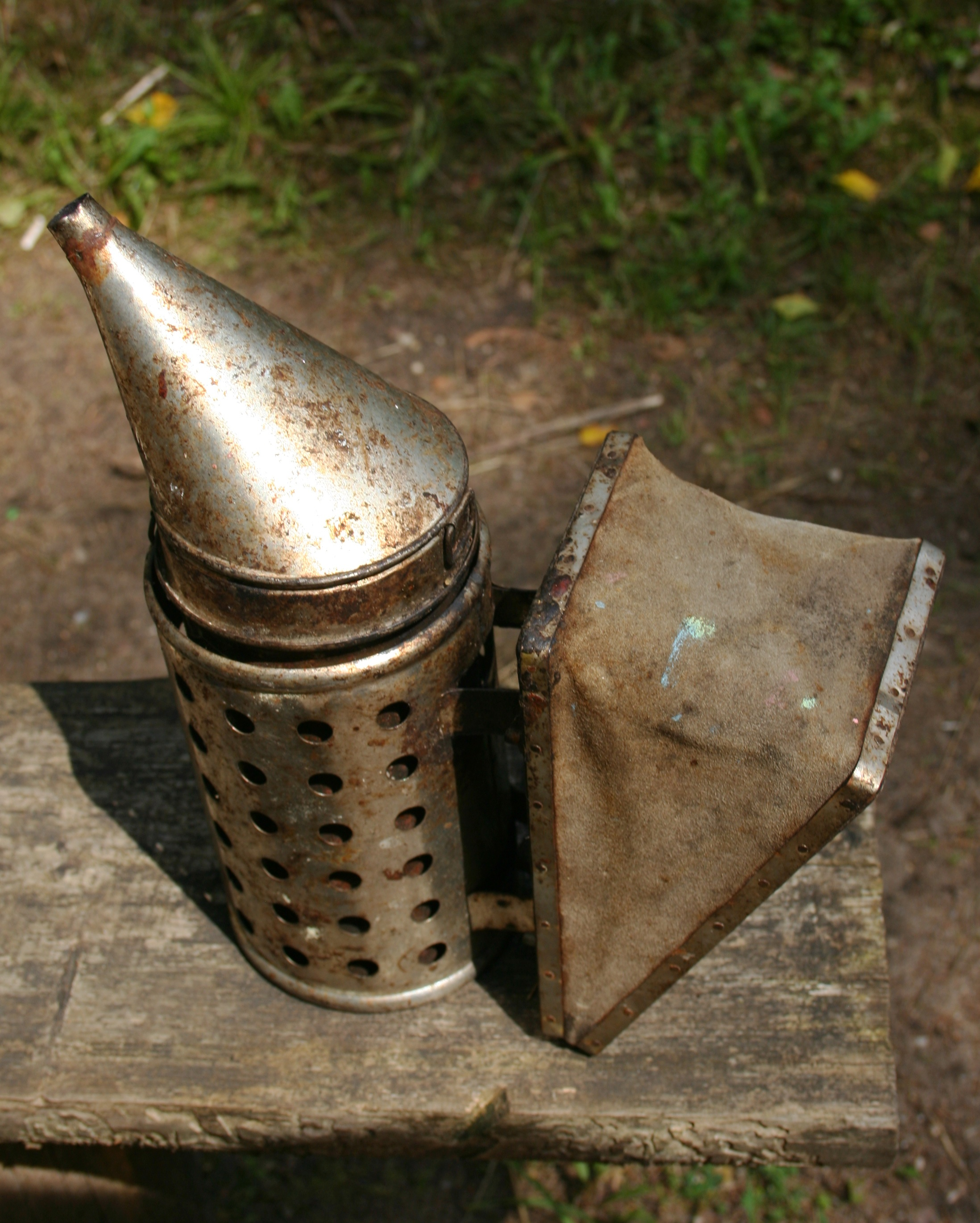 podkurzacz dla pasiek na stoisku przy drodze ze wsi Bryzgiel do Płociczna, na południe od stanowiska widokowego na jezioro Wigry